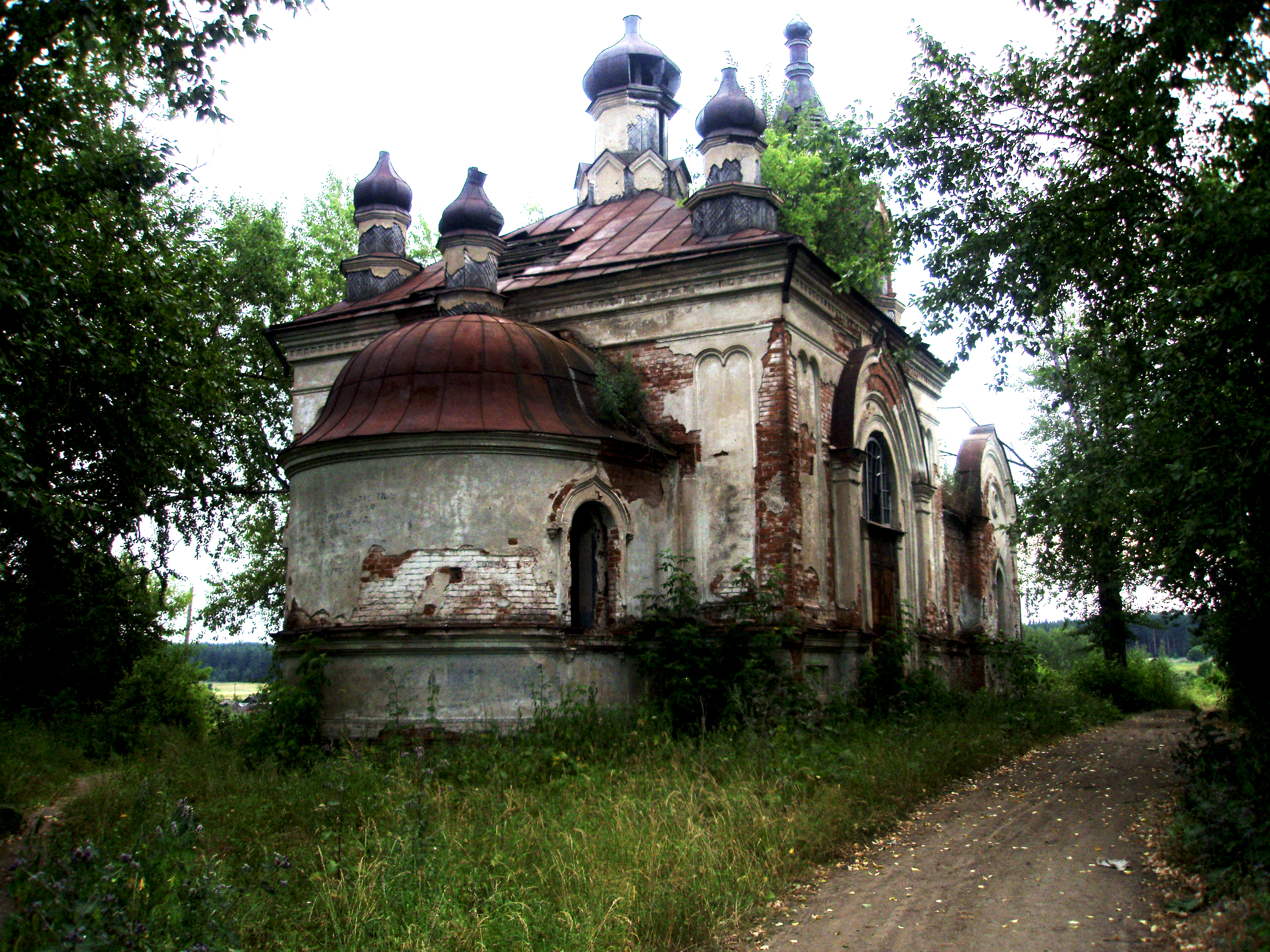 Церковь рождества Иоанна Предтечи в с.Старая Башкарка